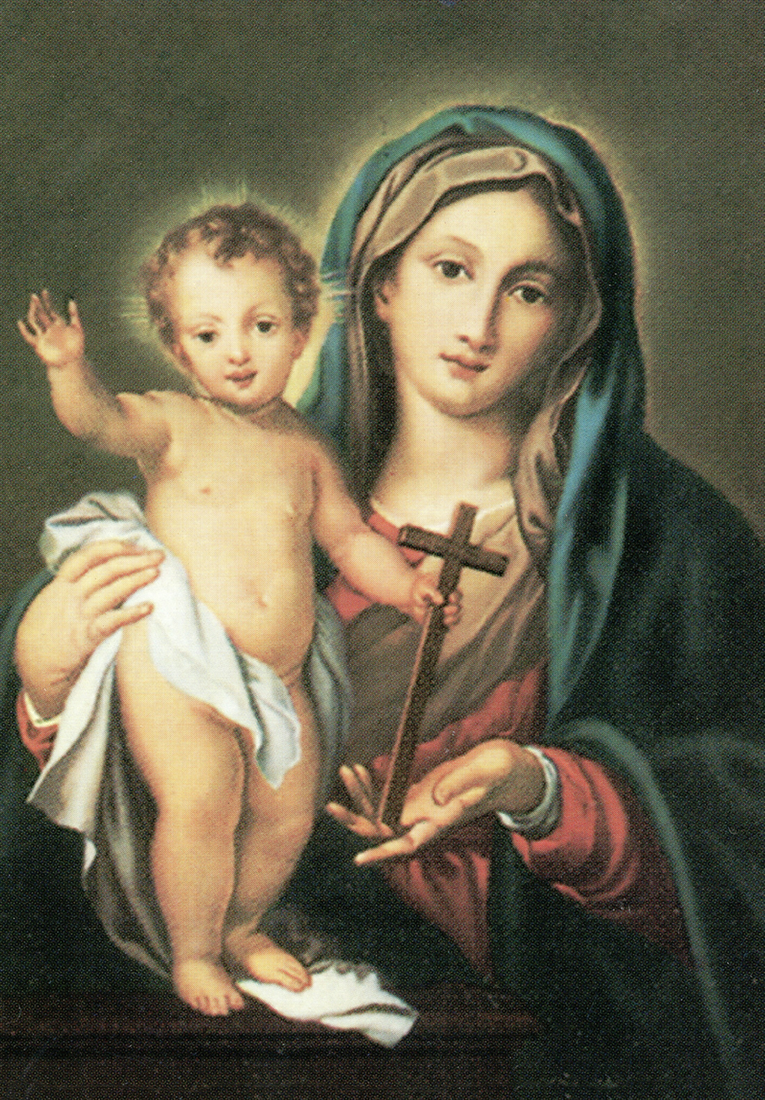 Imagen Original de la Madre de la Santa Esperanza